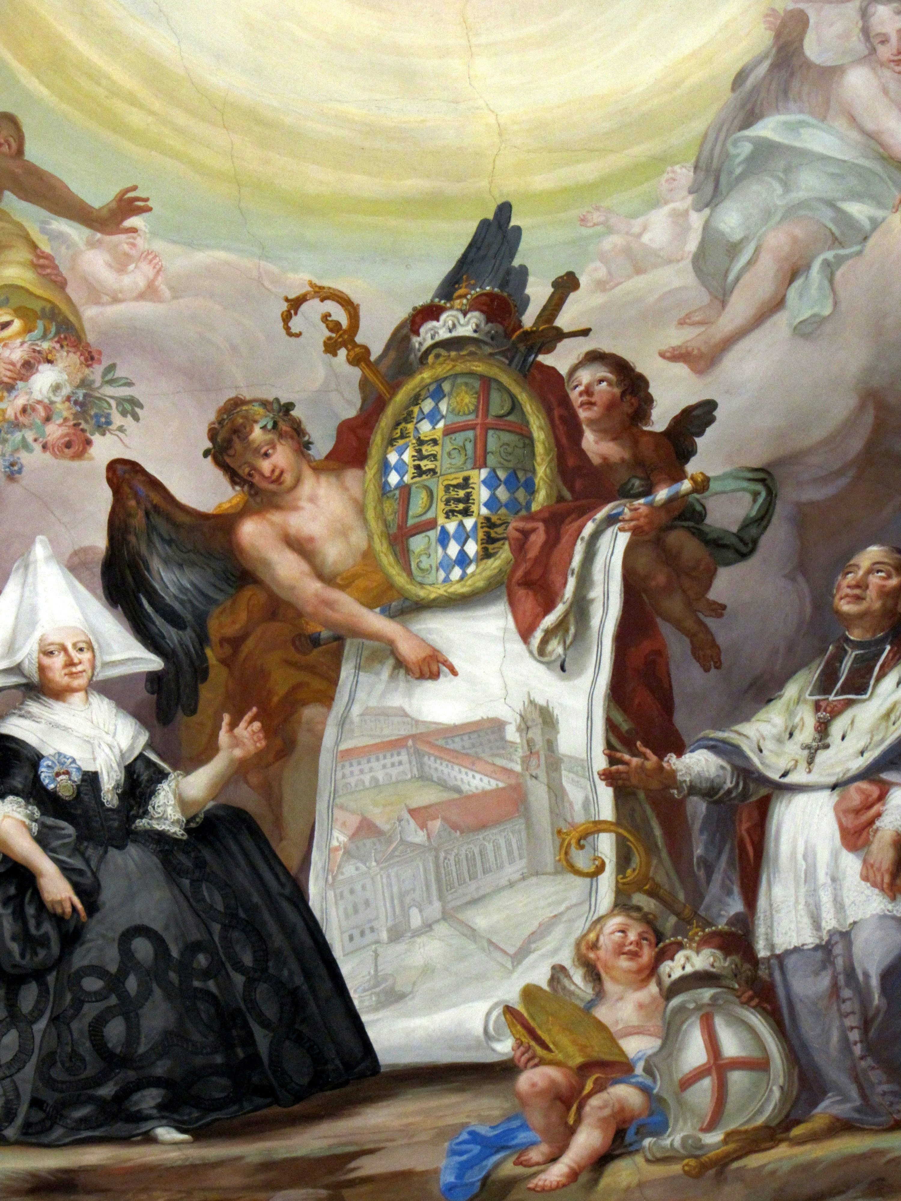 Teil von File:Maria-Maximiliana-von-Stadion.jpg